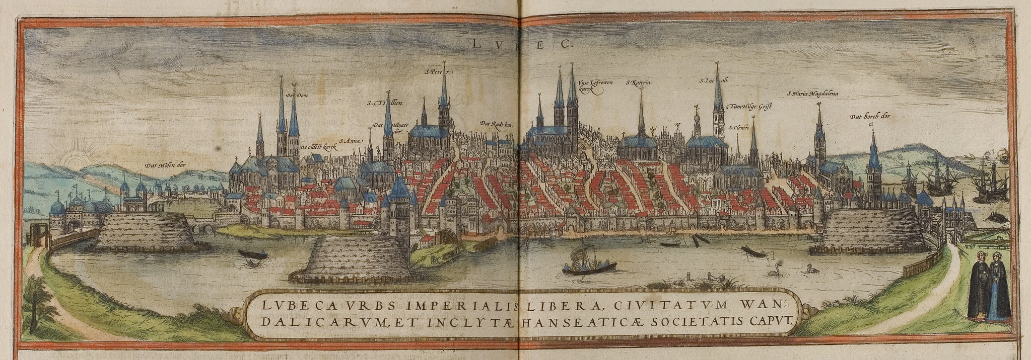 Lübeck